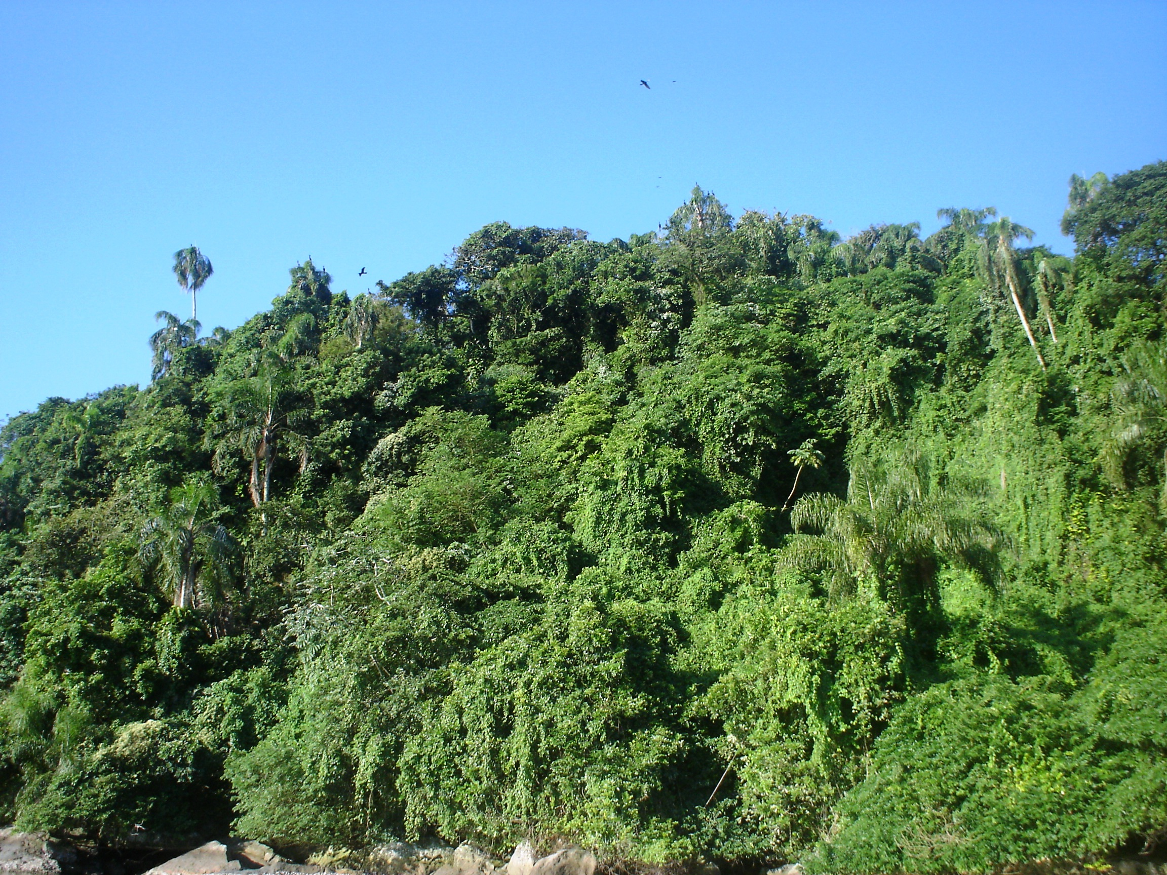 Foresta atlantica vista dal mare, con cormorani